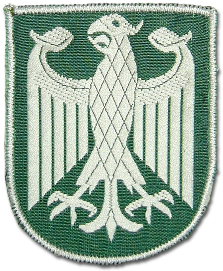 Bundesadler auf dem Ärmelabzeichen des Bundesgrenzschutzes (heute Bundespolizei)